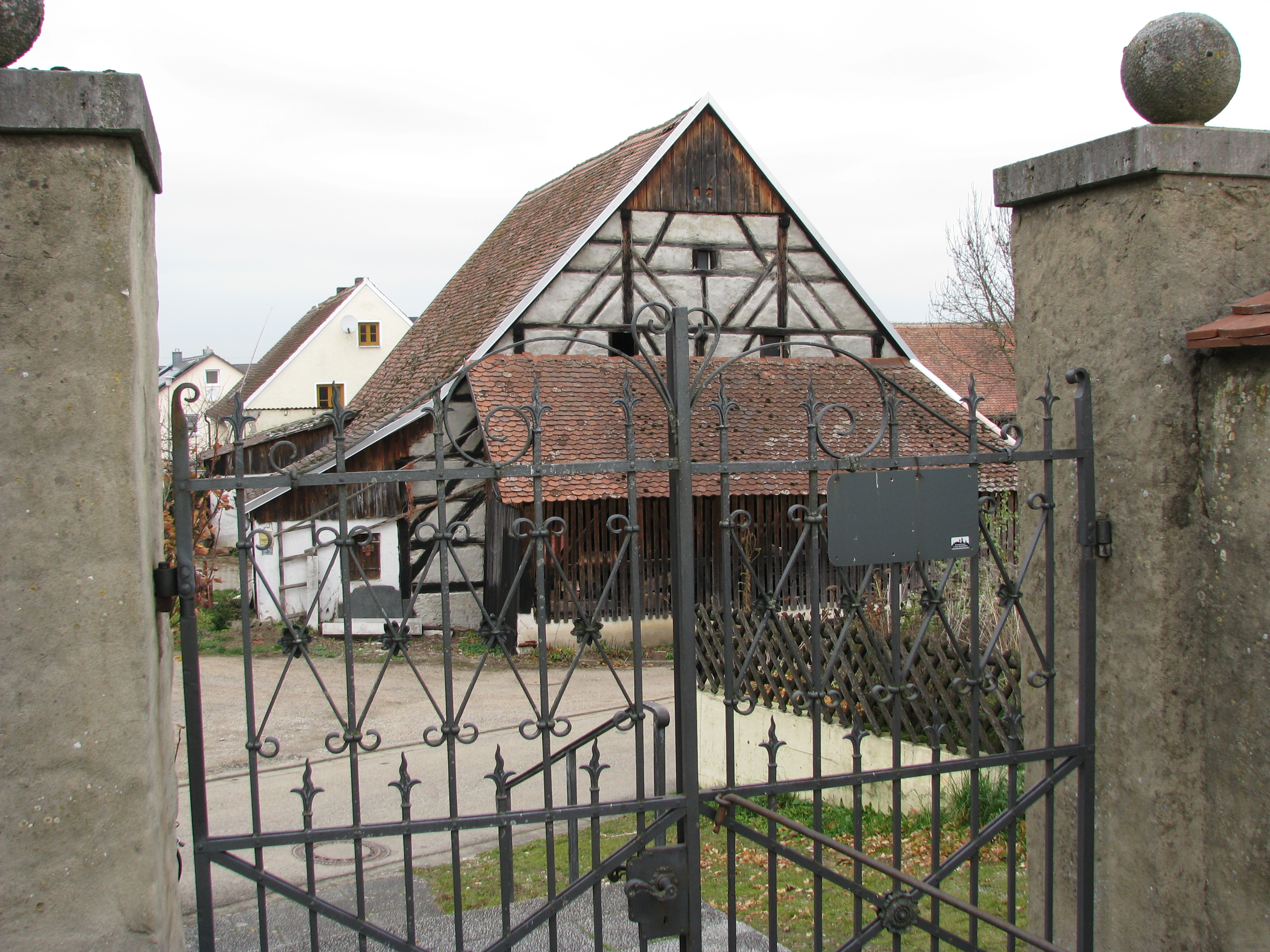 Großberghausen, Ortsteil von Freystadt im Landkreis Neumarkt in der Oberpfalz, Fachwerkstadel